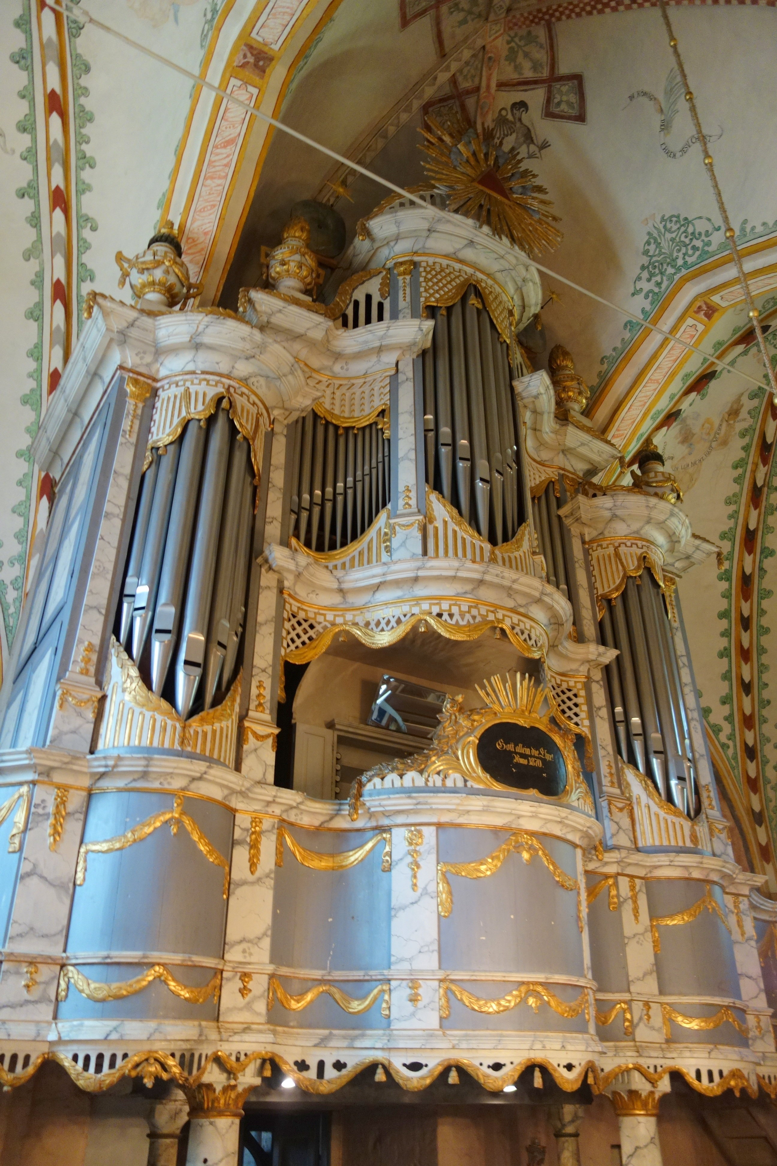 Kirche Rerik, Landkreis Rostock, Mecklenburg-Vorpommern, Deutschland